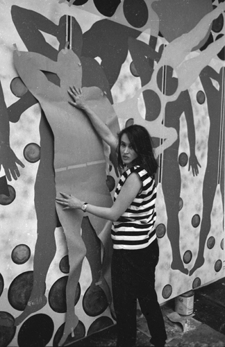 Kiki Kogelnik in Early 1960s New York